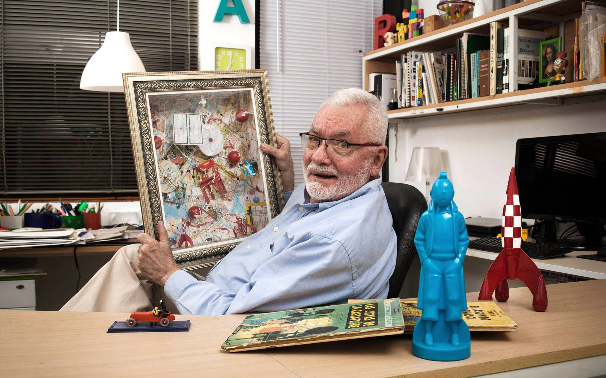 Gustavo Sorzano